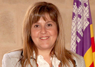 Joana Maria Camps Bosch, consellera d'Educació, Cultura i Universitats del Govern de les Illes Balears des del 2 de maig de 2013.